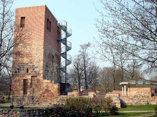 Podelzig - Ruine der Dorfkirche